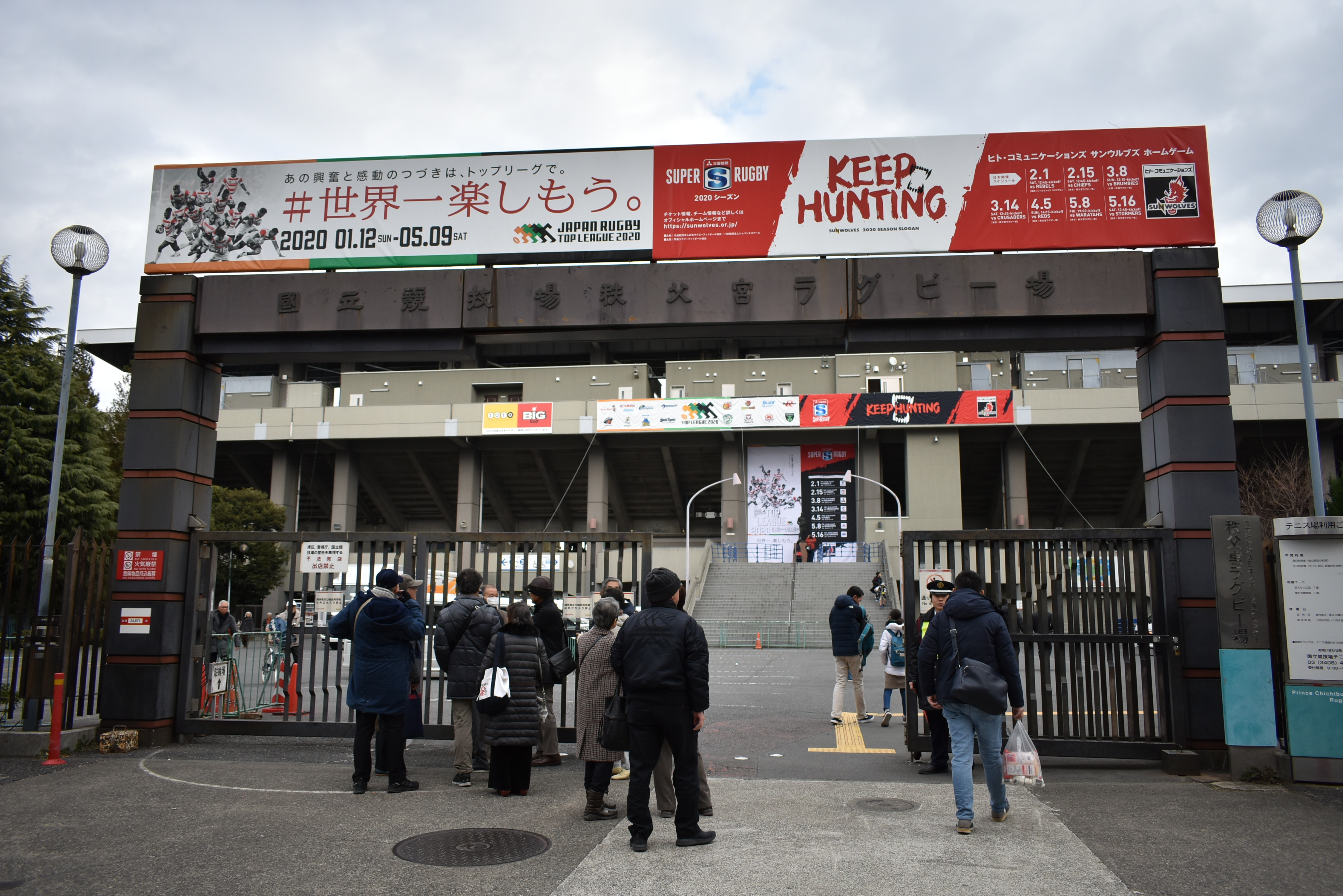 サンウルブズ